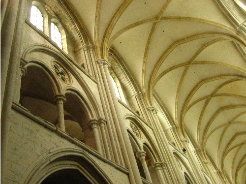 voûte de la nef, église abbatiale de Fécamp, Seine-Maritime, Haute-Normandie, France